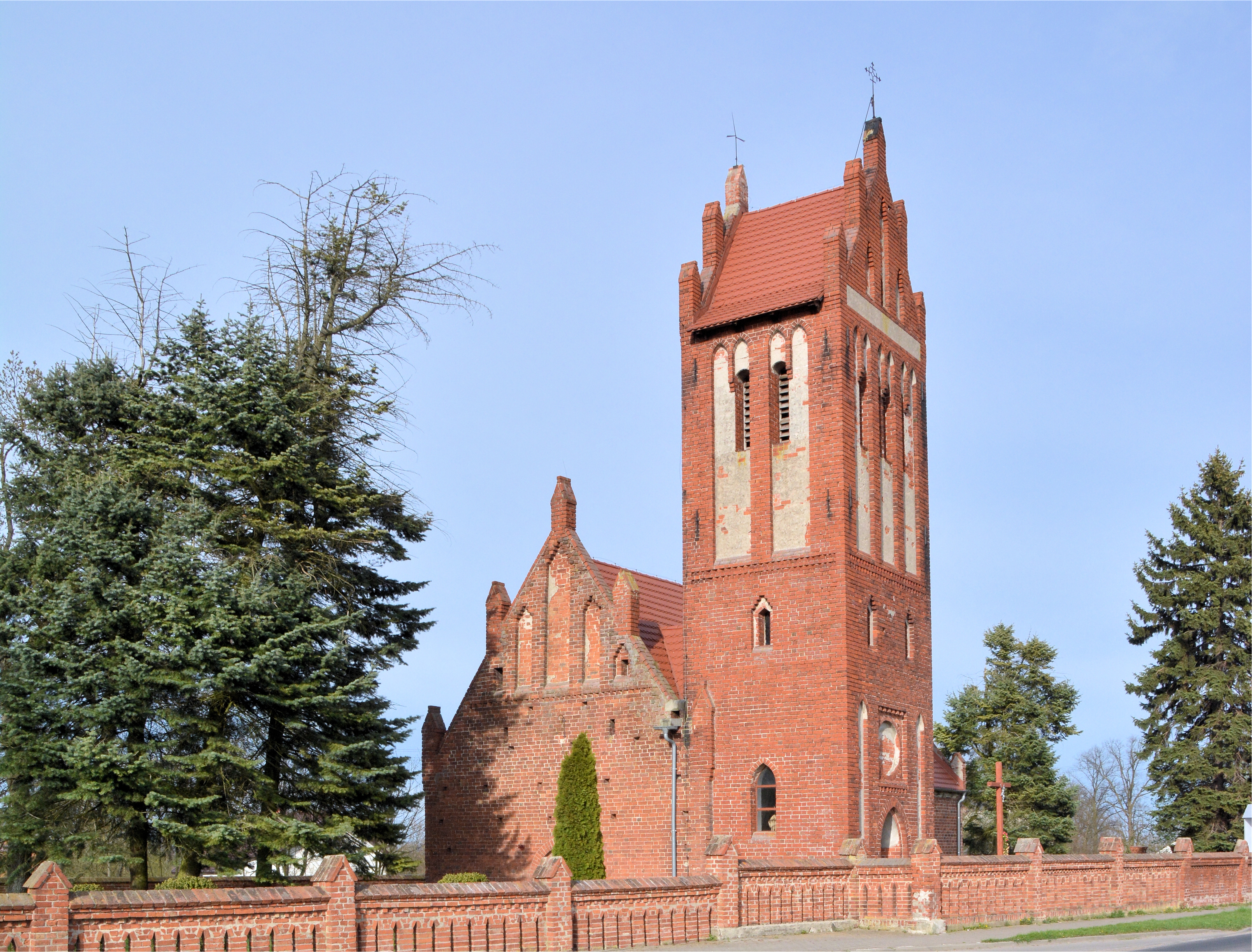 Mechowo - rzymskokatolicki kościół filialny p.w. św. Izydora, XIV, 1738, 1861